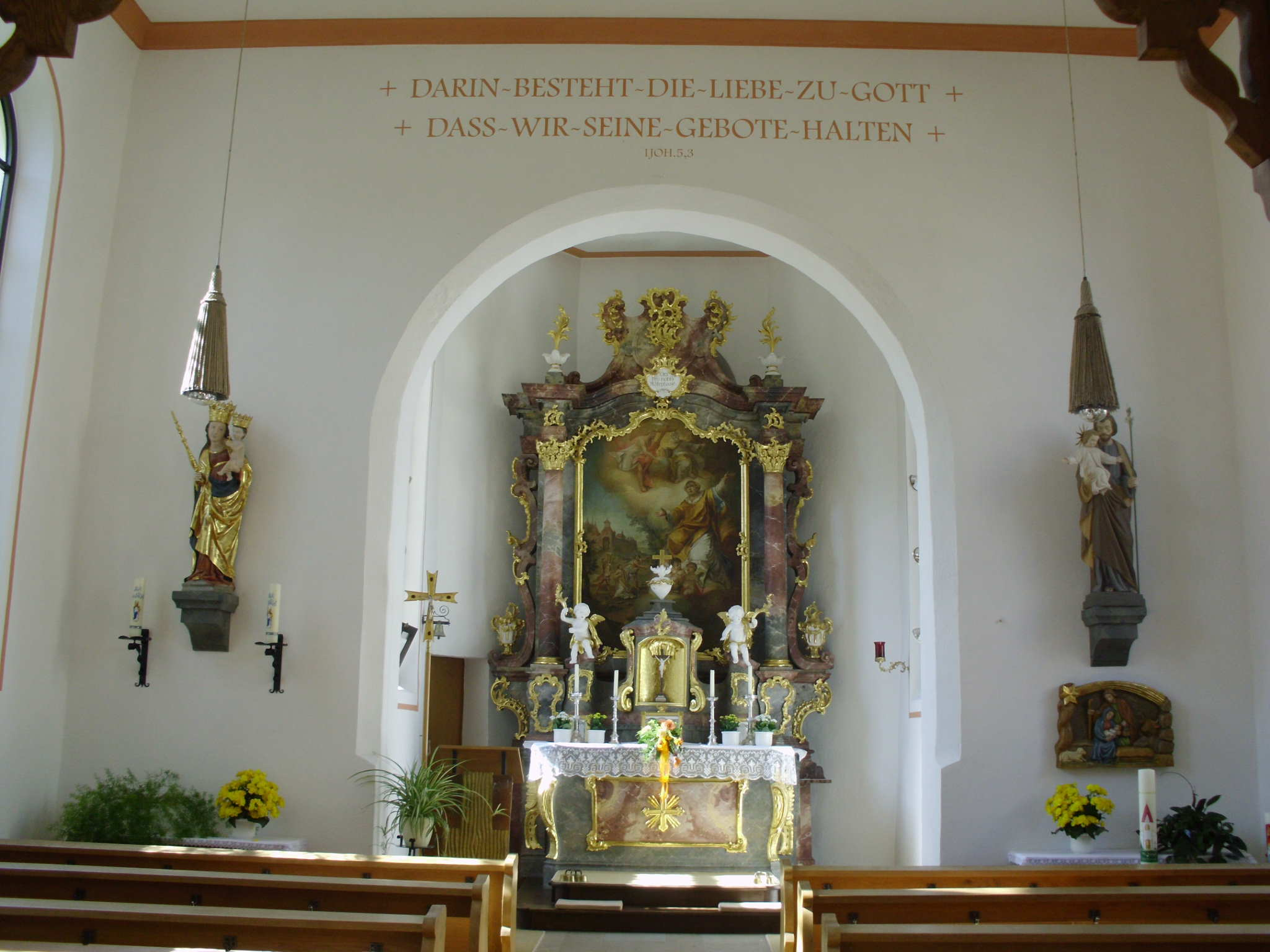 Kath. Kirche St. Joasef in Ramsberg (Landkreis Weißenburg-Gunzenhausen), Stirnwand mit Chor